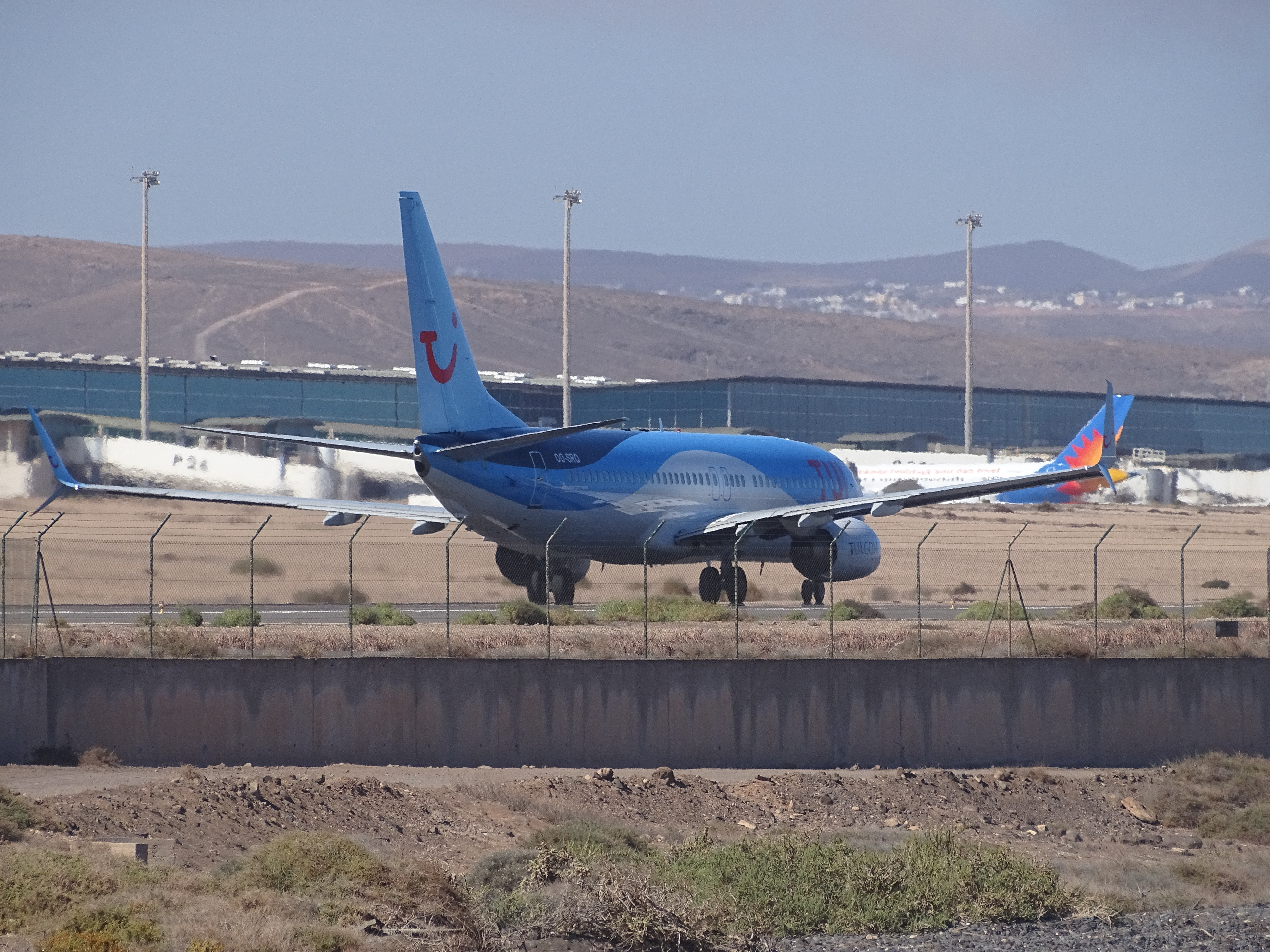 letiště